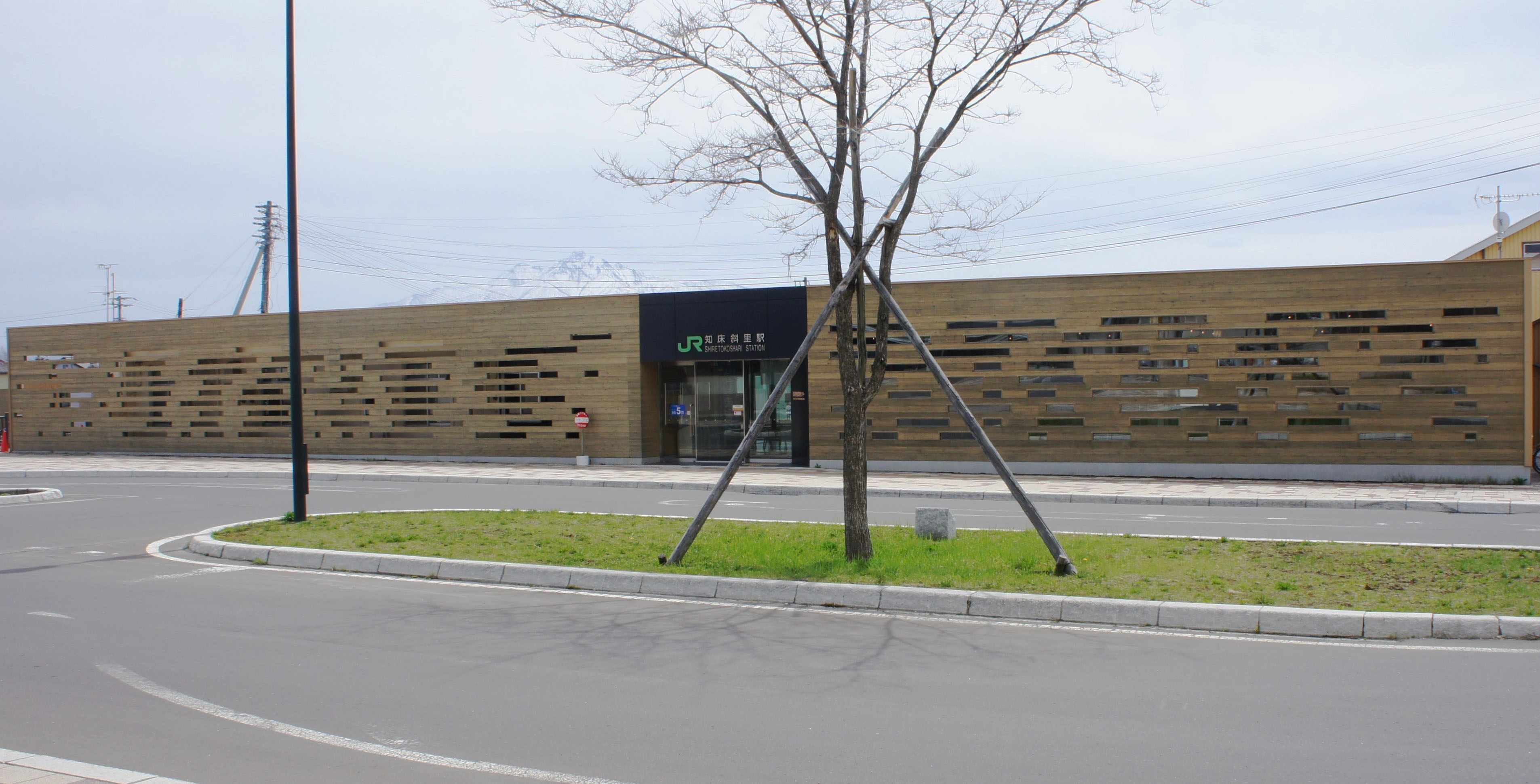 JR釧網本線・知床斜里駅の駅舎